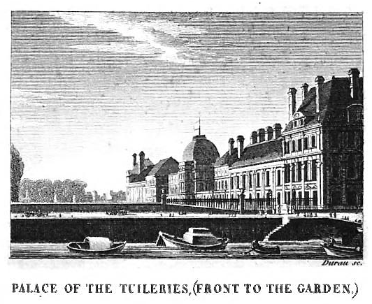 Paris